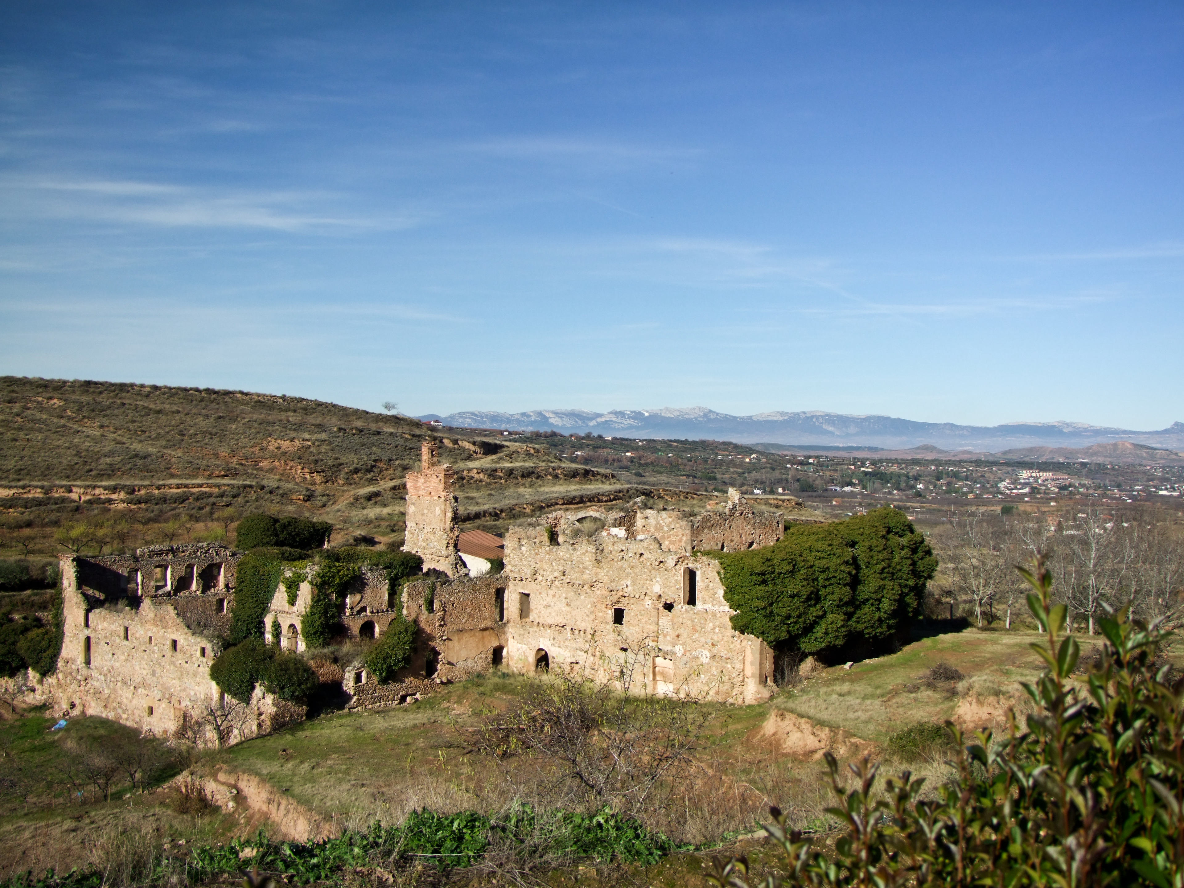 Ex Convento de San Francisco en la localidad de Nalda, La Rioja - España